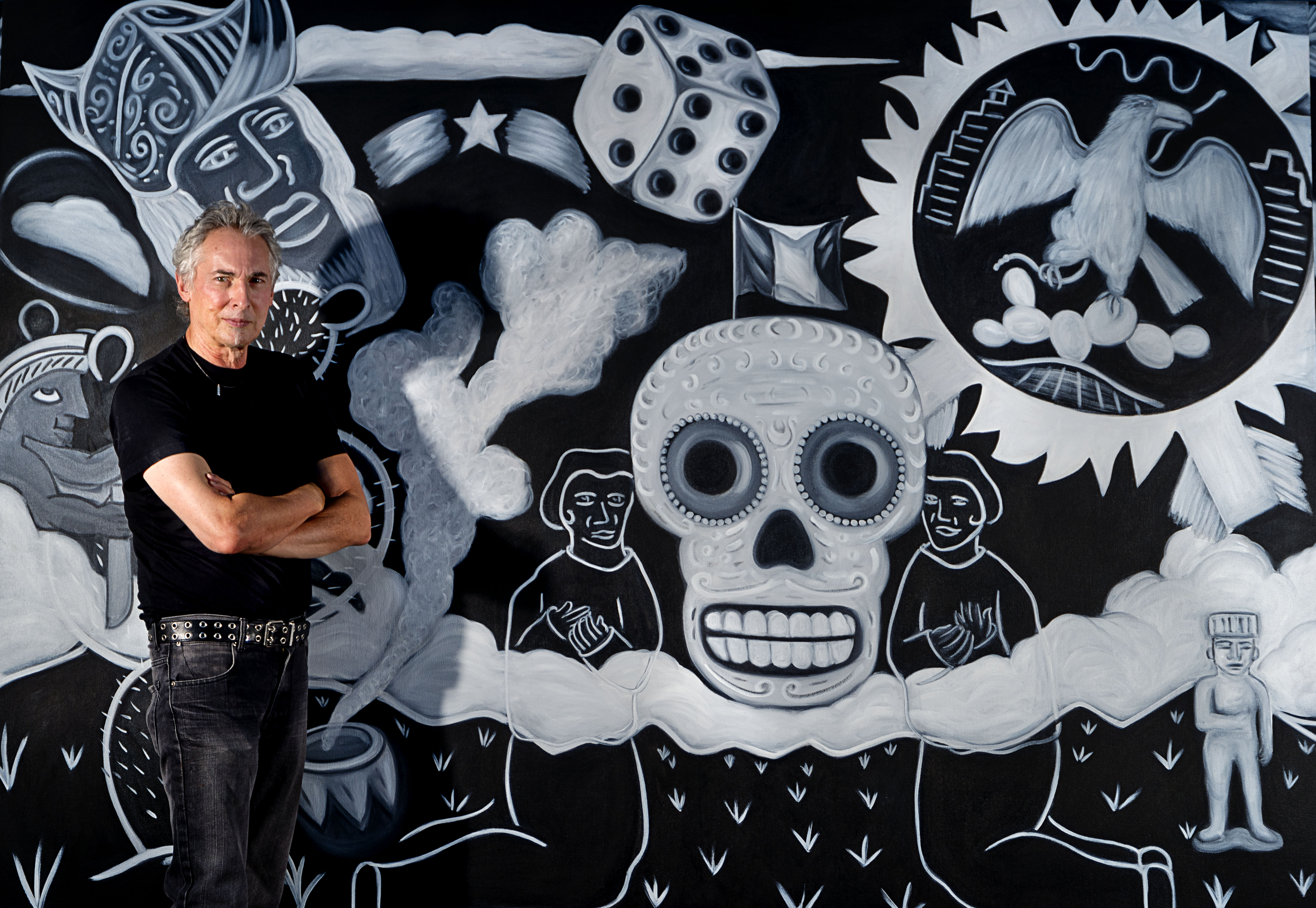 Retrato del Artista Barry Wolfryd Fotografía de Juan San Juan